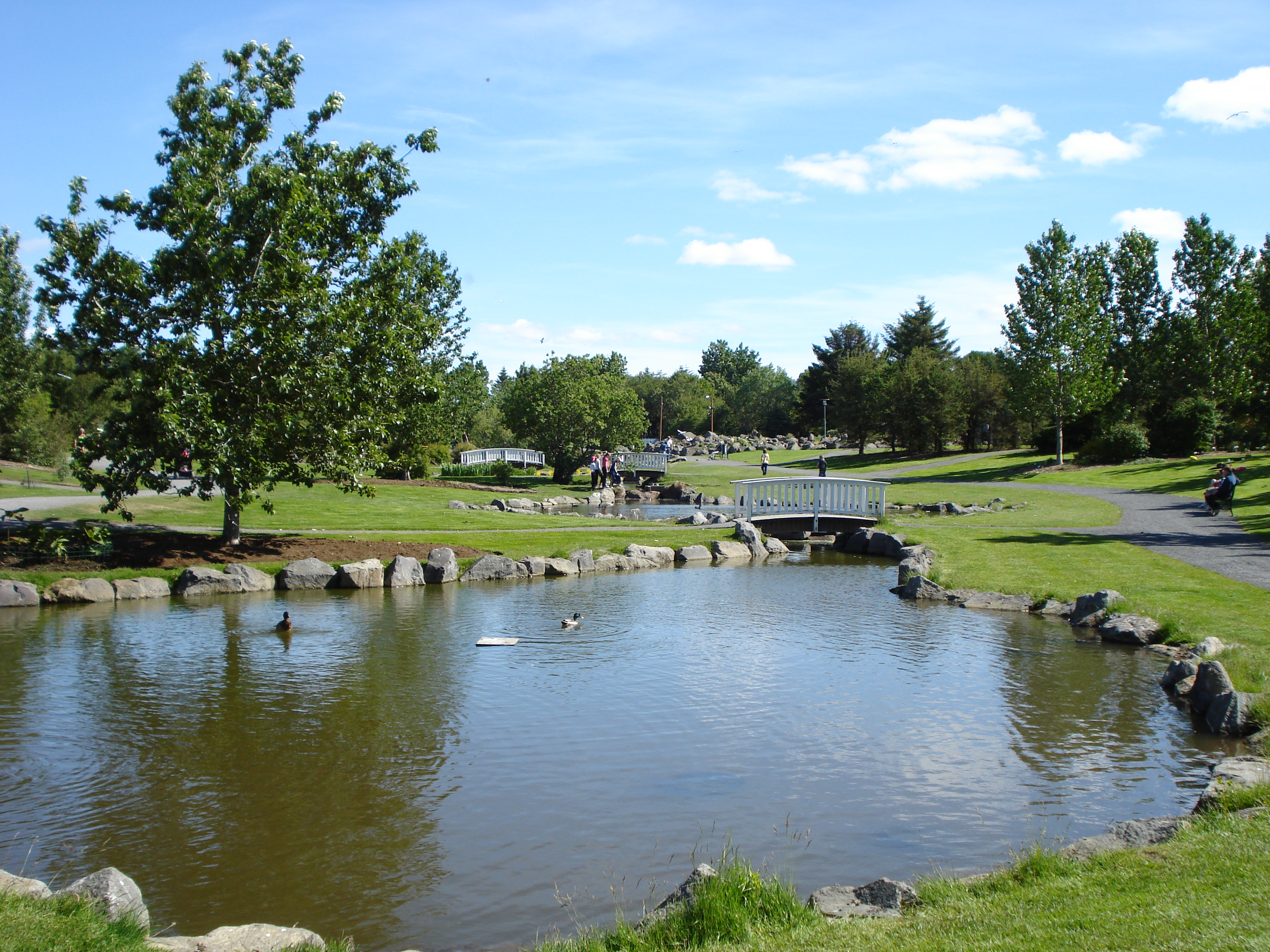 Grasagarður, Hortus Botanicus, Reykjavik, Iceland